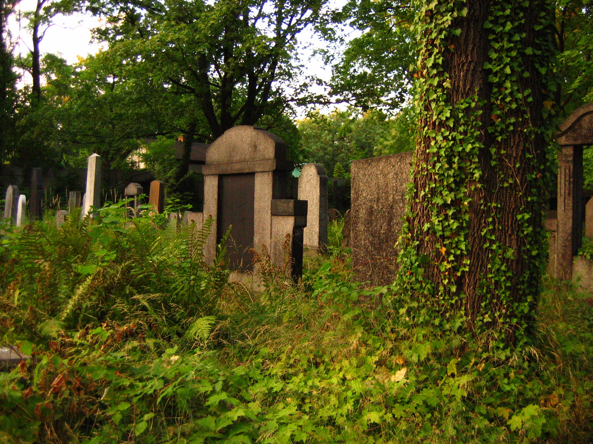 Kirkut w Gliwiach - Jewish Cemetery in Gliwice